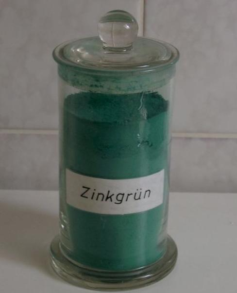 Zinkgruen